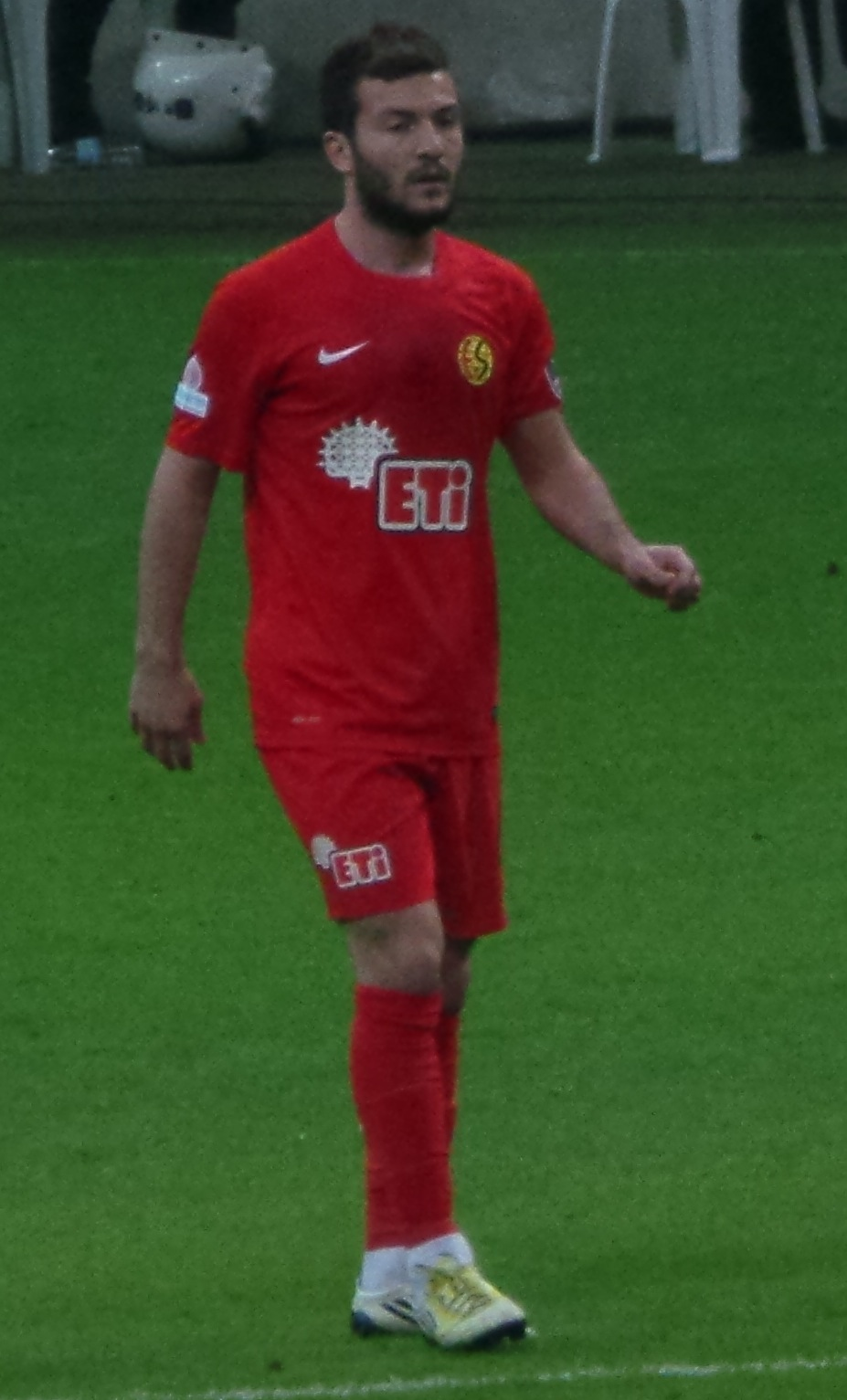 Özgür Çek